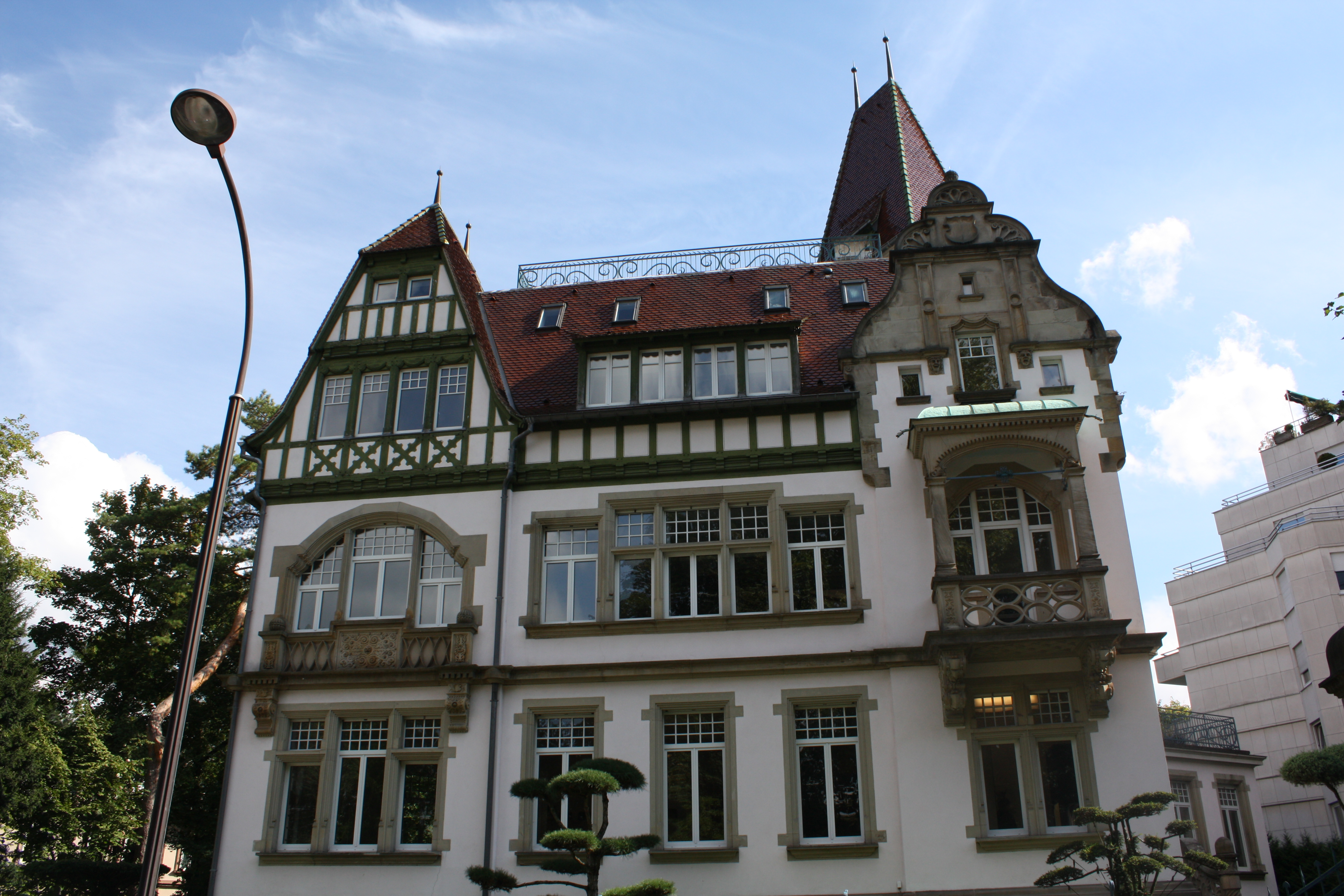 Manoir du Contades n°02